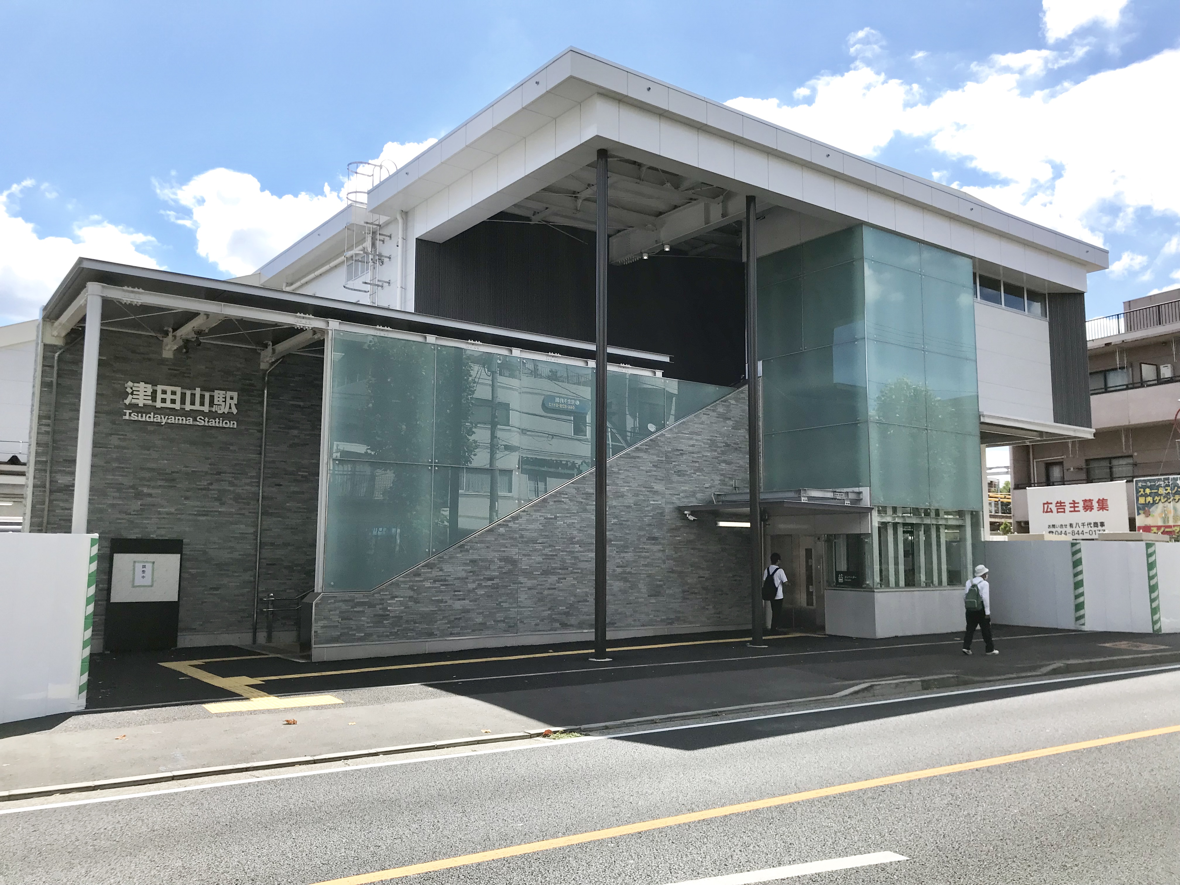 津田山駅駅舎北口